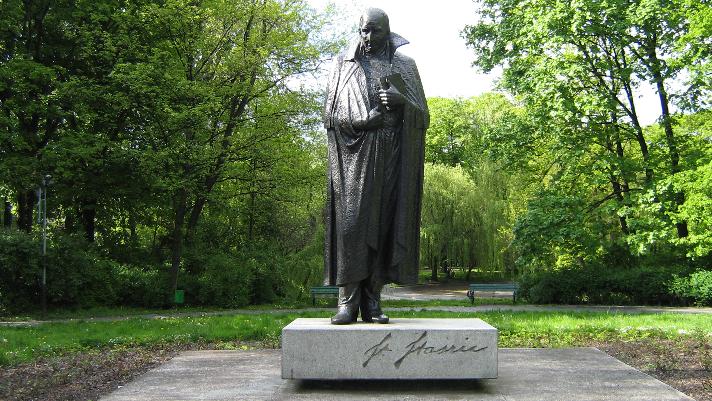 Park im. Staszica w Łodzi - pomnik S. Staszica